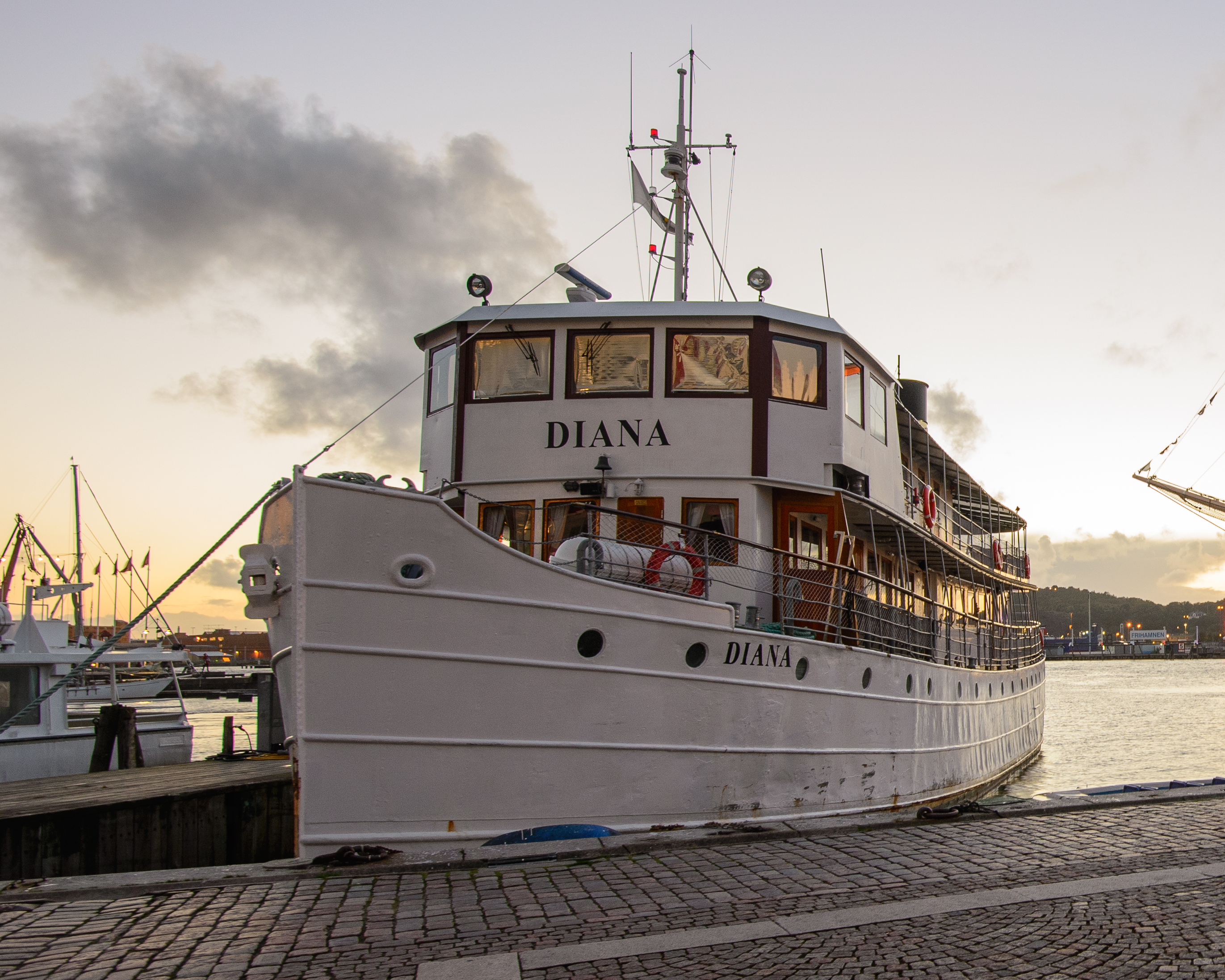 Diana (1931)